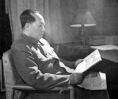 1961年，毛泽东在杭州阅读《人民日报》